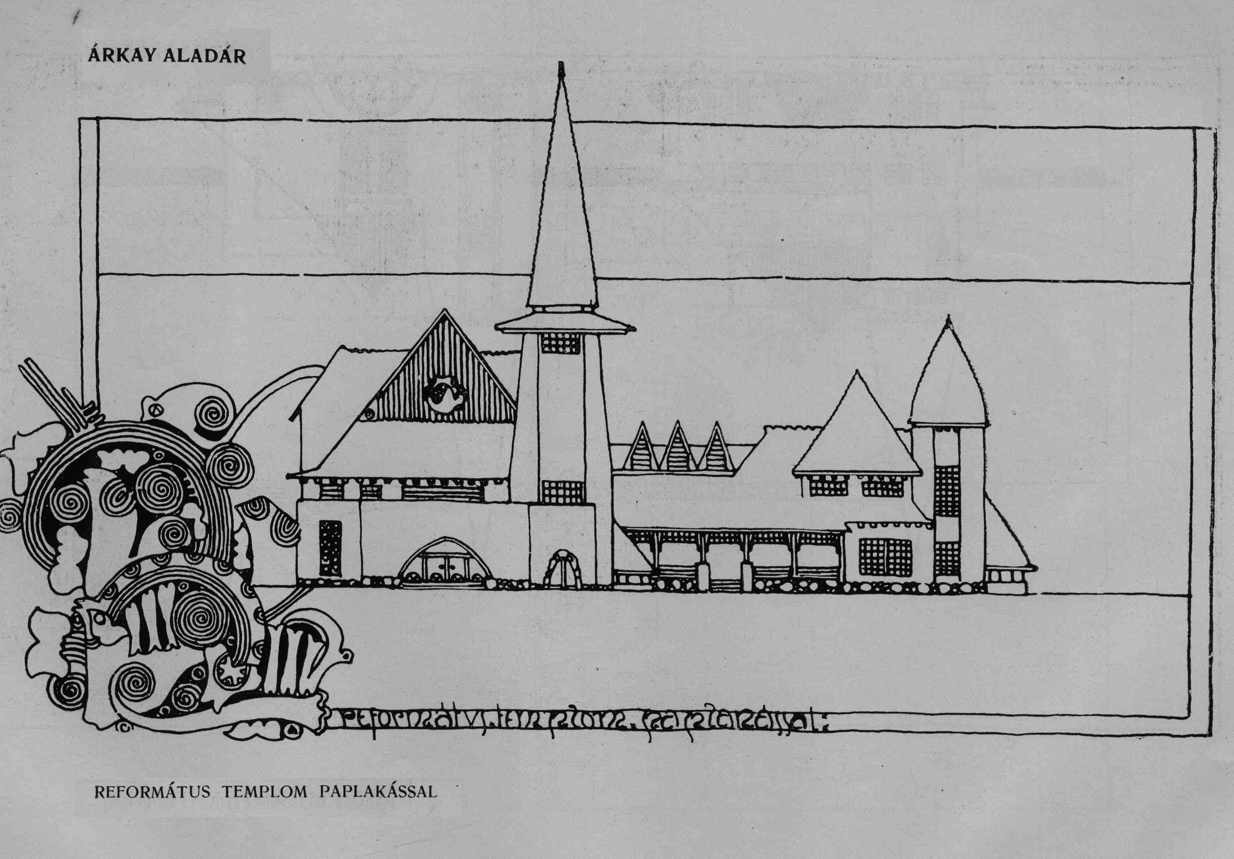 Református templom paplakkal terv